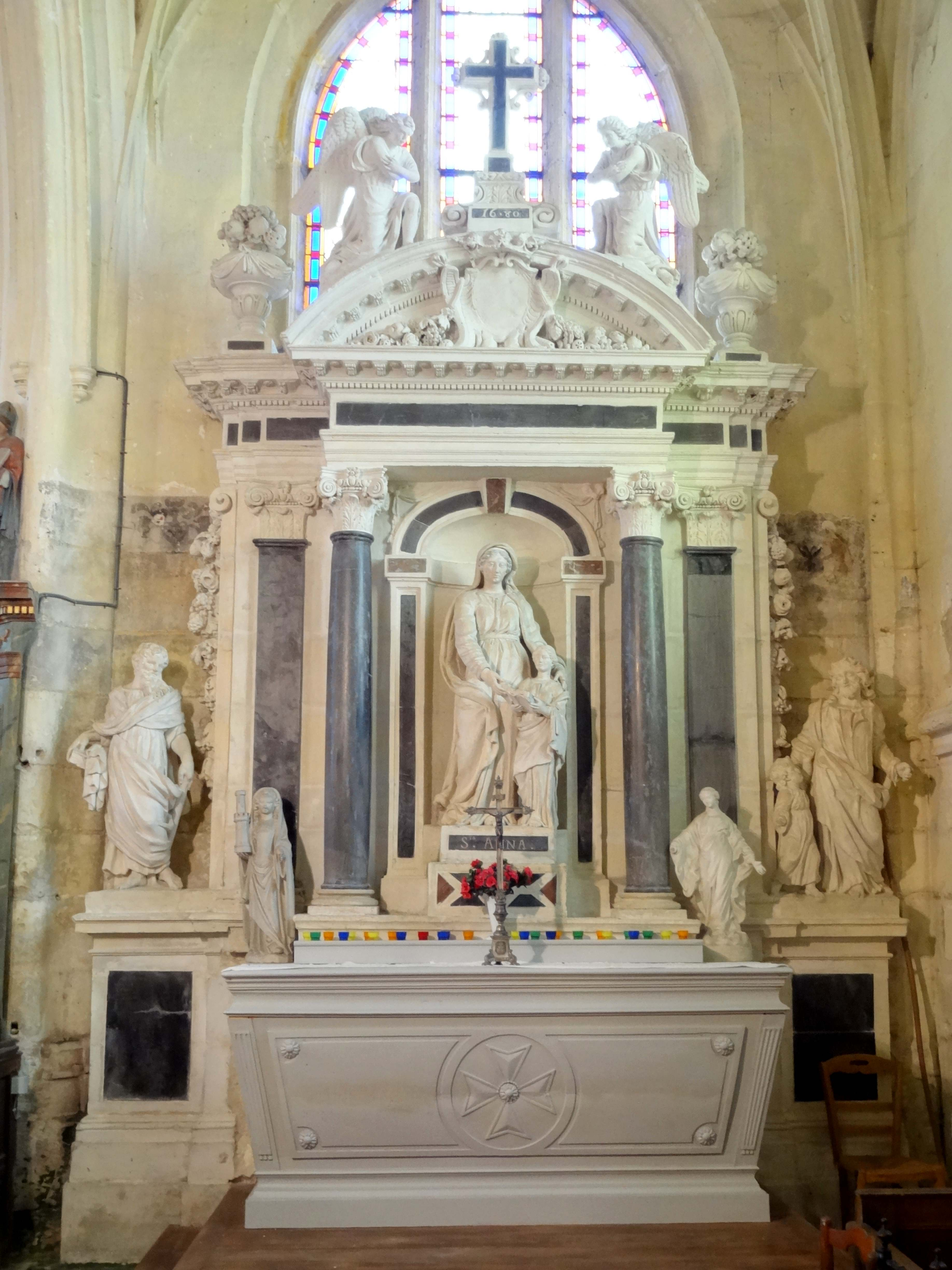 Collatéral sud, autel de sainte Anne.